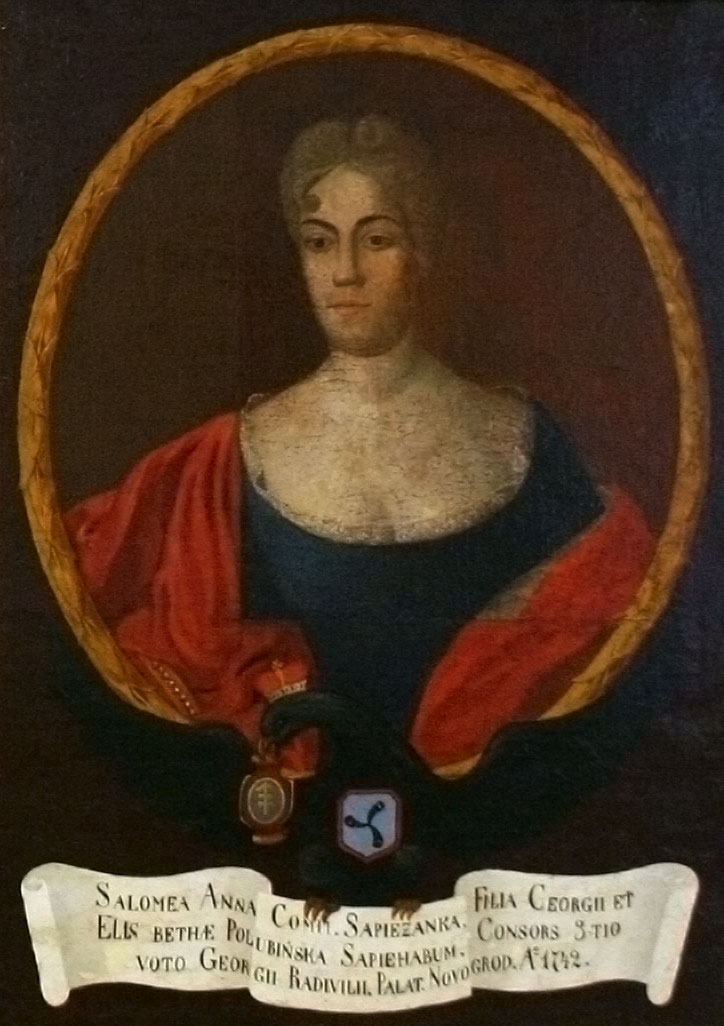 Беларуская (тарашкевіца): Партрэт Салямэі Радзівіл (Salamieja Radzivił) з роду Сапегаў (Sapieha)